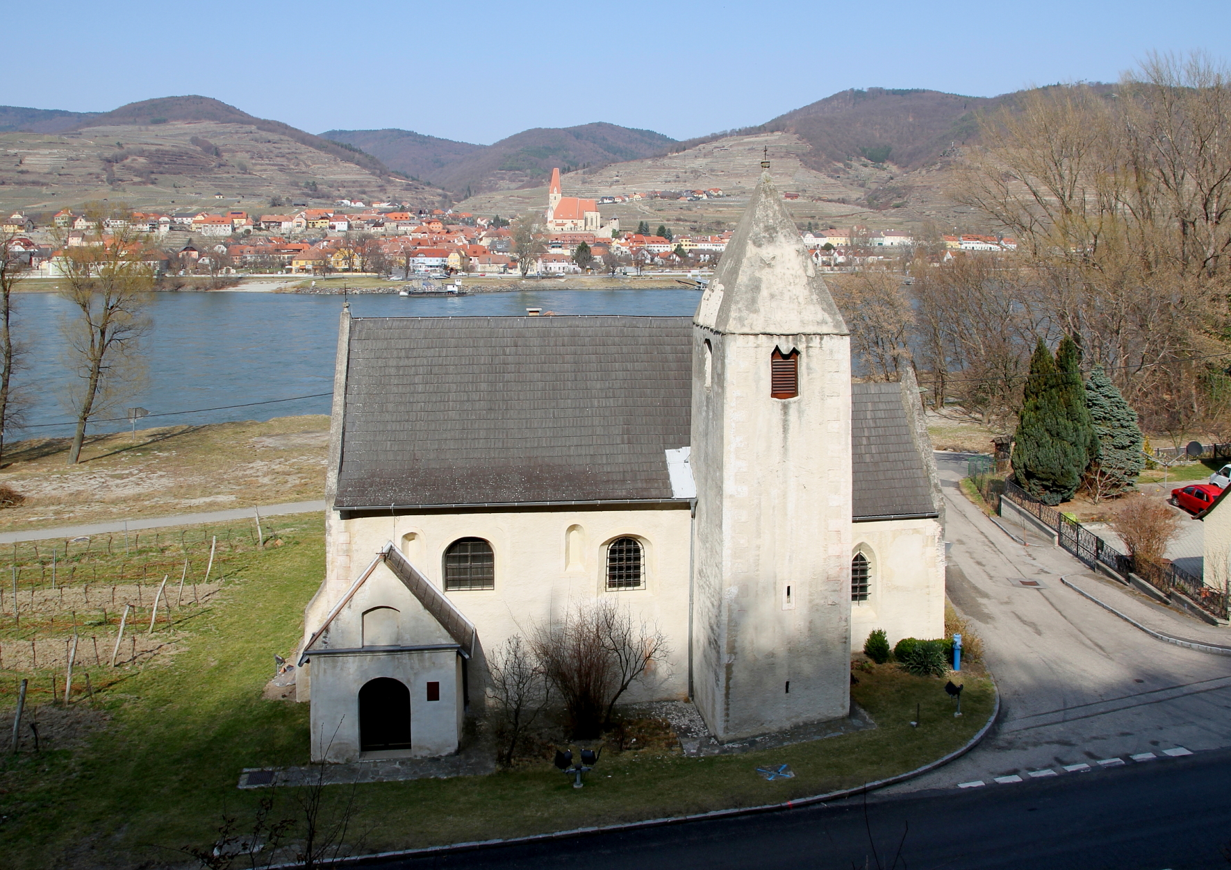 Die katholische Filialkirche hl. Lorenz in St. Lorenz, eine Ortschaft in der niederösterreichischen Marktgemeinde Rossatz-Arnsdorf. Eine romanische Chorquadratkirche, die an die Südseite eines römischen Burgus angebaut wurde. Im Hintergrund Weißenkirchen in der Wachau.